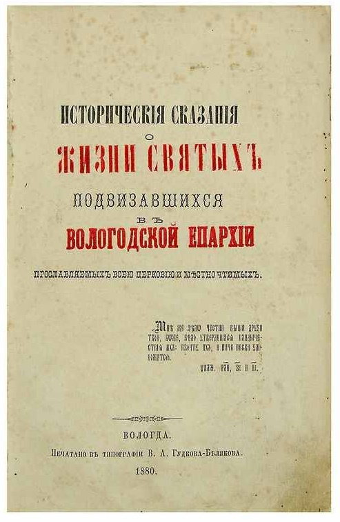 Верюжский. Исторические сказания о жизни святых, подвизавшихся в Вологодской епархии, прославляемых всею Церковию и местно чтимых. 1880 год